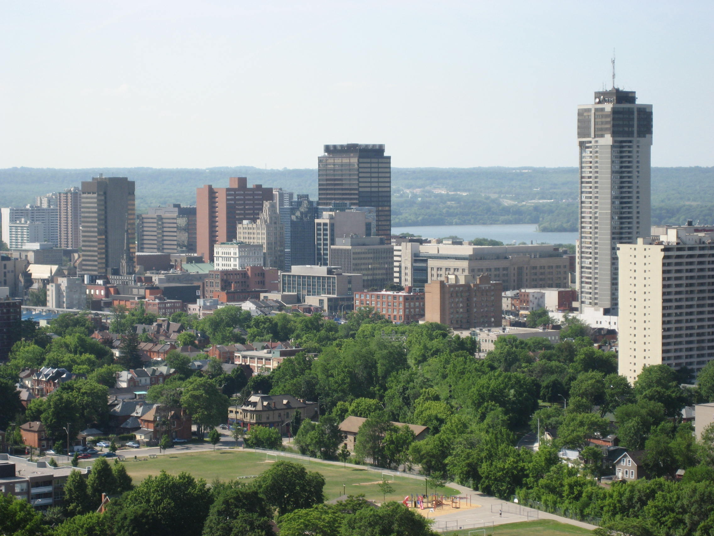 City Skyline, Hamilton, Ontario